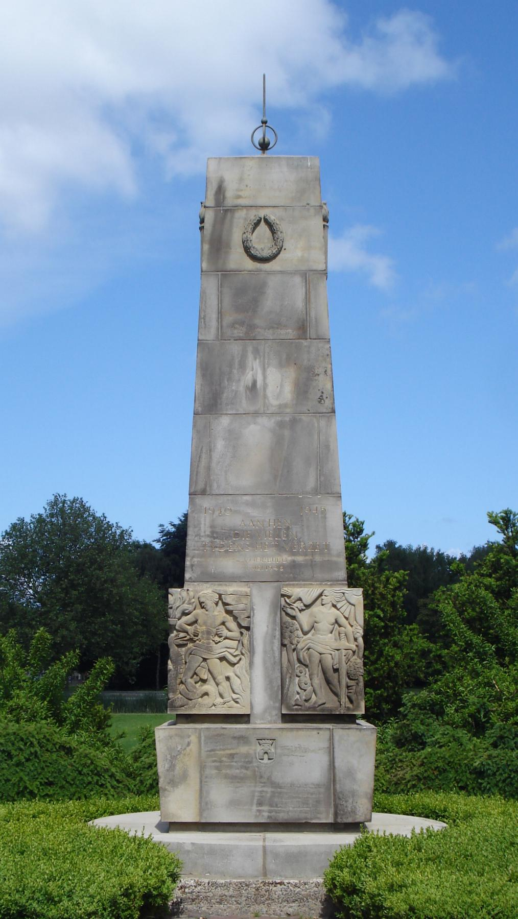 Voorburg, Prins Bernhardlaan/Park 't Loo. Verzetsmonument van Gerard van Remmen. The Netherlands. FOP.